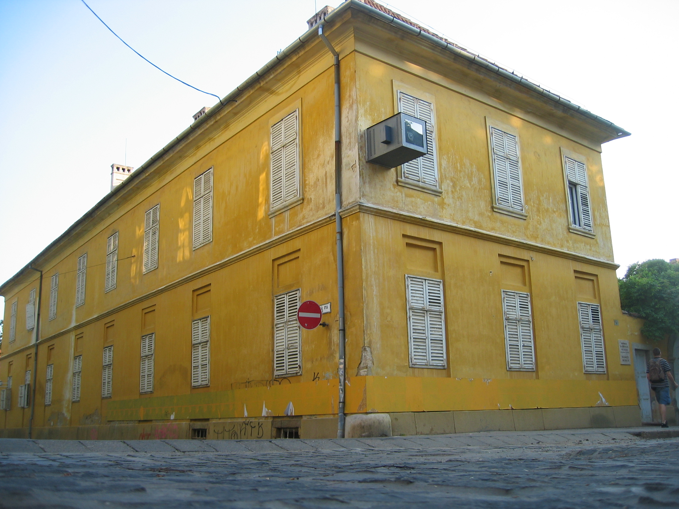 Victor Vasarely in Museum Pécs